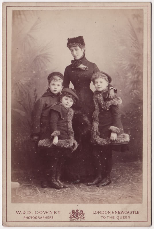 Patsy Cornwallis-West z dziećmi. Od lewej: Daisy, Shelagh i Georg.